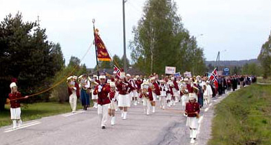 Skogbygda Skolekorps, Skogbygda